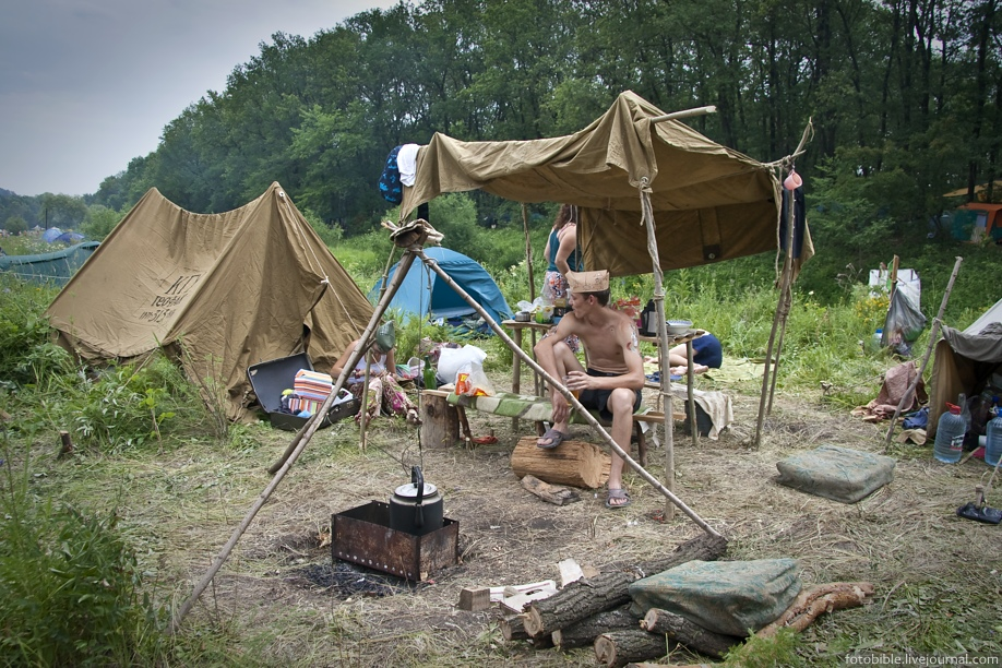 Грушинский фестиваль, Самарская область, Россия